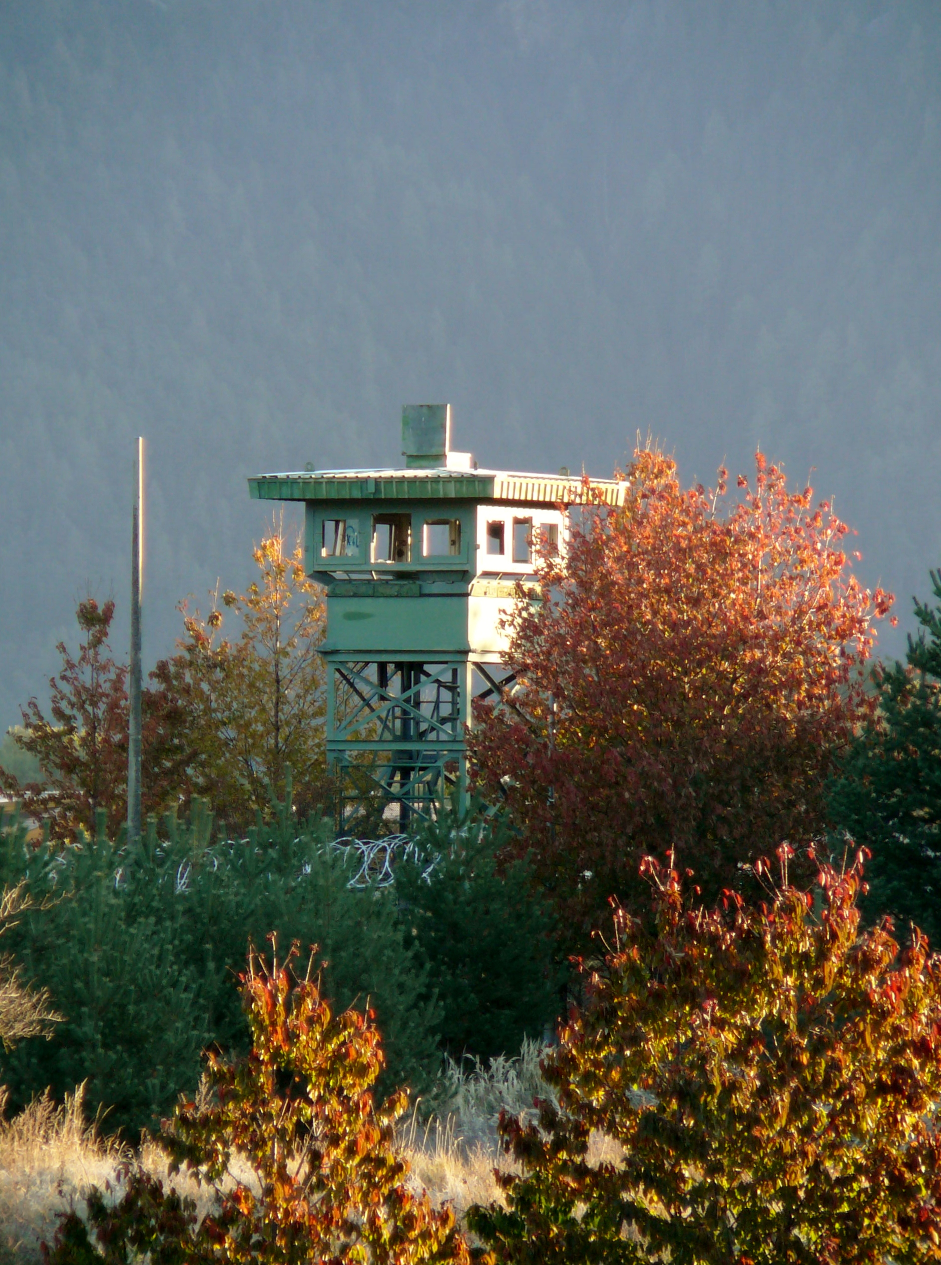 Site Rigel, torretta est